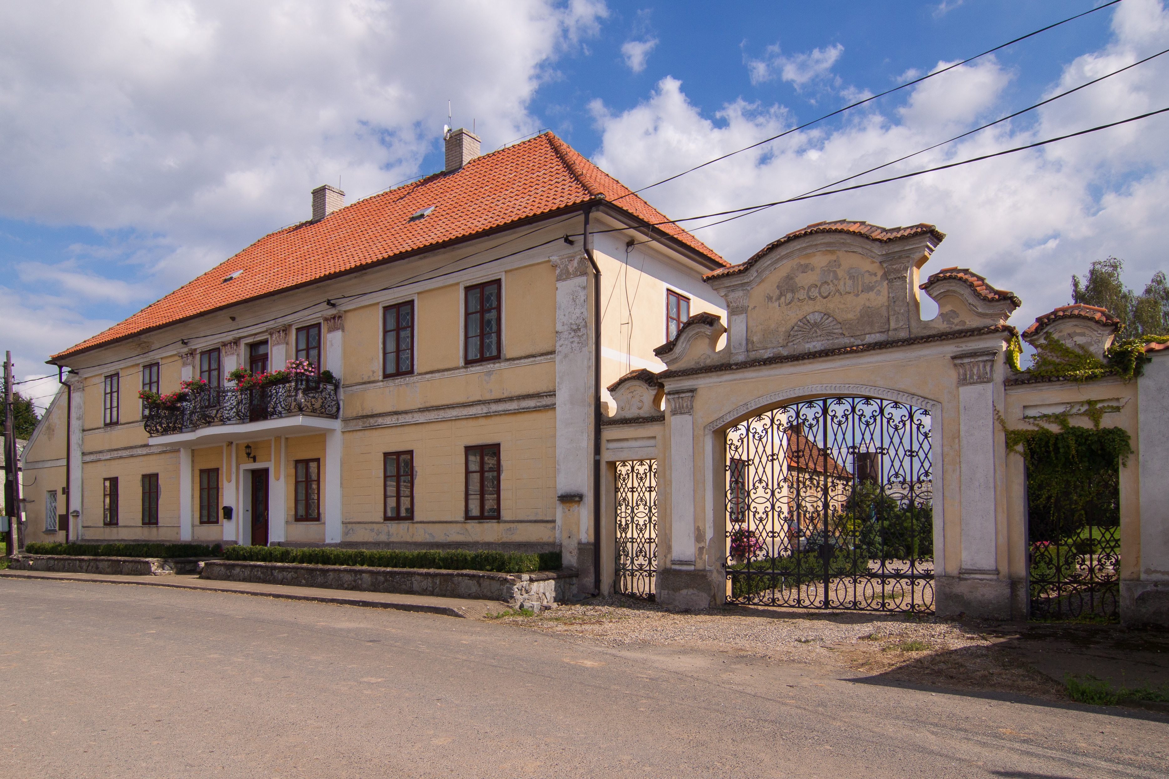 Venkovská usedlost, Choroušky 5